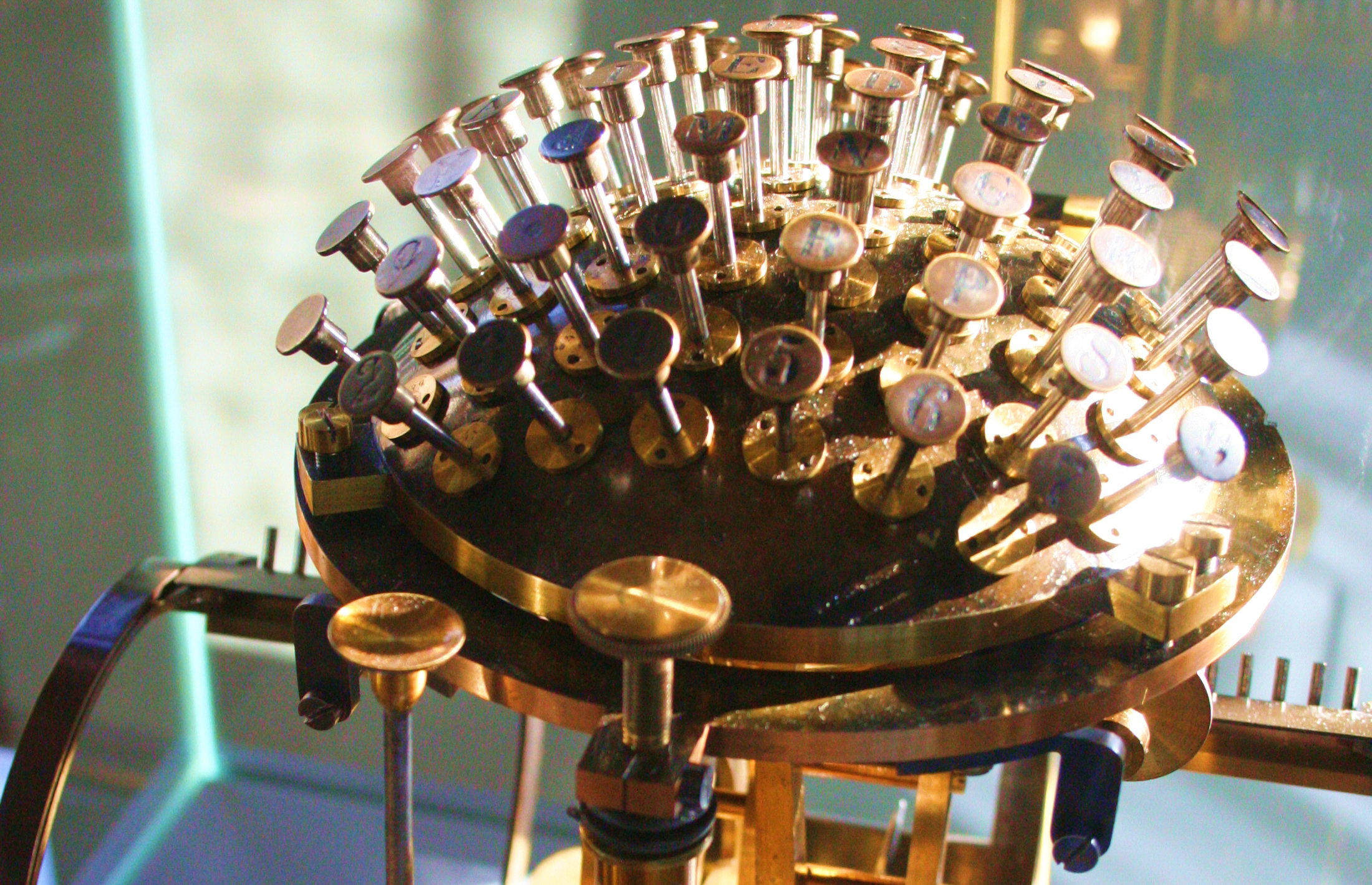 Fotografiert im ehem. Nietzsche-Archiv in Weimar. Die Schreibkugel (dän. Skrivekugle) ist ein Vorläufer der Schreibmaschine, mit der man allerdings nur Majuskeln tippen konnte. "«SCHREIBKUGEL IST EIN DING GLEICH MIR . . .»: Mit diesem Anthropomorphismus beginnt Nietzsches - inzwischen berühmt gewordenes - Gedicht auf jene Schreibmaschine, die er im Februar 1882, in Genua weilend, als Geschenk seiner Schwester Elisabeth von seinem Freund Paul Rée mitgebracht bekam. Wie das Gedicht sagt, handelte es sich um eine Schreibkugel, eine Malling-Hansen, aus Kopenhagen, die besonders für blinde Schreiber entwickelt worden war und auch für den halbblinden Nietzsche von Nutzen sein konnte. [...] Nach sechs Wochen gab er das Experiment «Schreibmaschine» wieder auf und fuhr fort, so sein Bekenntnis gegenüber dem Freund Overbeck, «wie ein Schwein» zu schreiben." Text-Quelle: "Nietzsches Anschlag" von Ludger Lütkehaus, in: Neue Zürcher Zeitung vom 25.02.2006 (Link